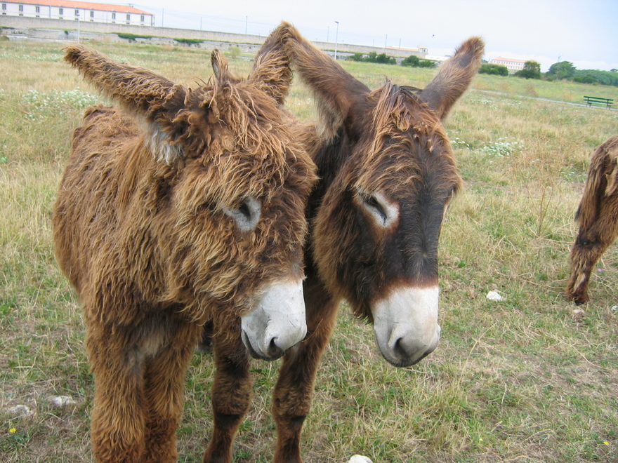 Âne du Poitou.France, Île de Ré, Saint-Martin-de-Ré.